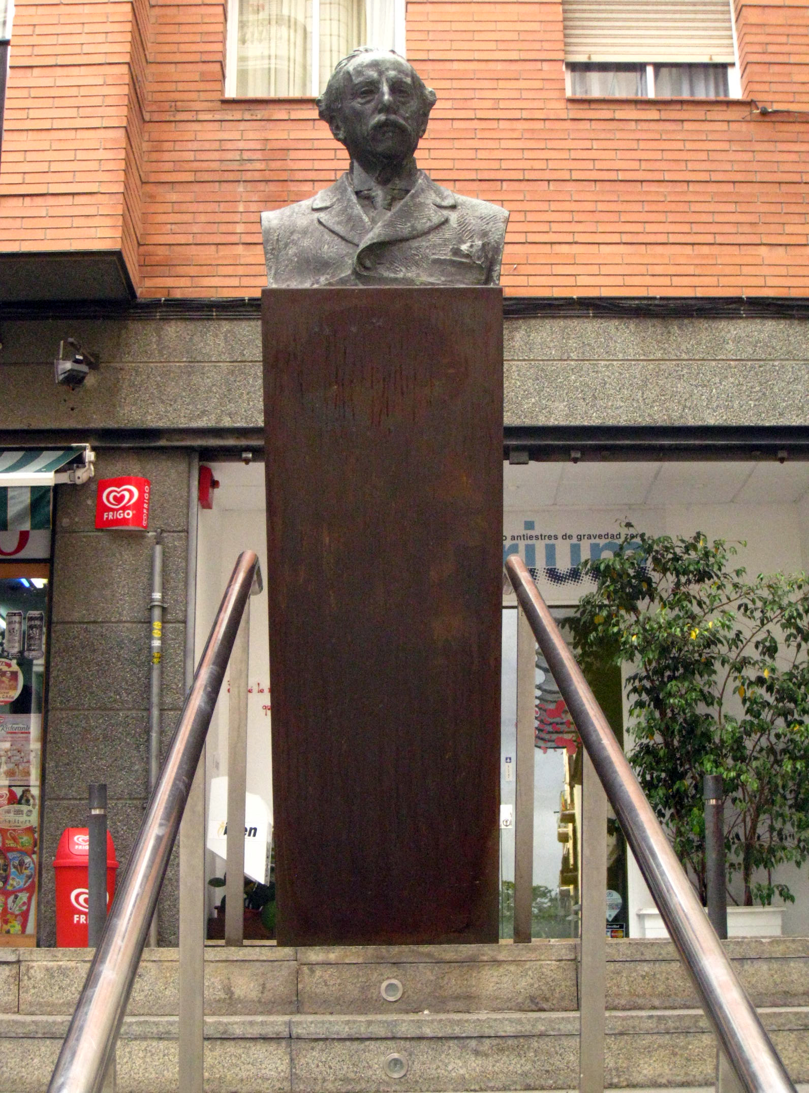 A Narcís Oller (Eusebi Arnau). Pl. Narcís Oller (Barcelona)